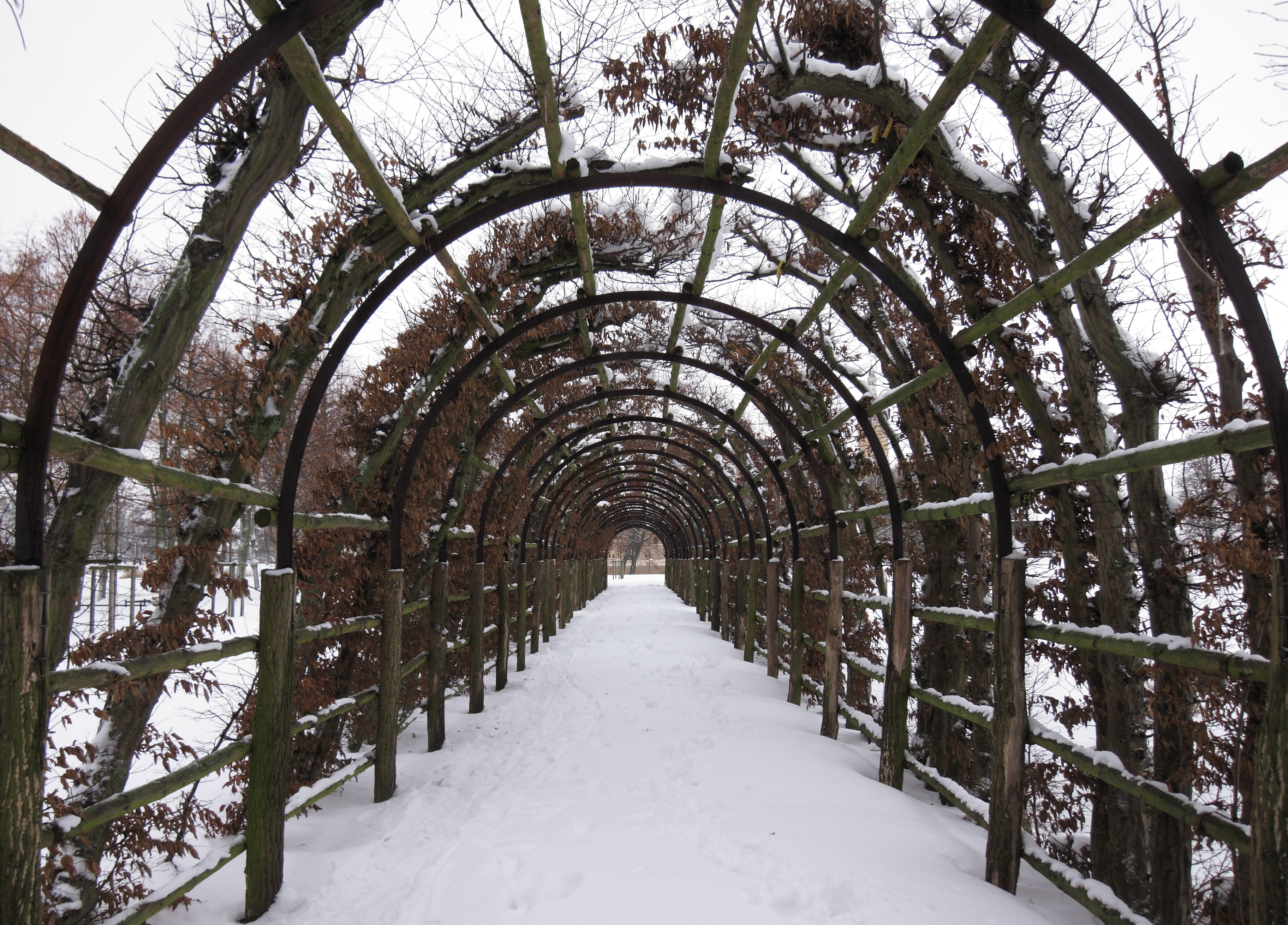 Tunnelblick